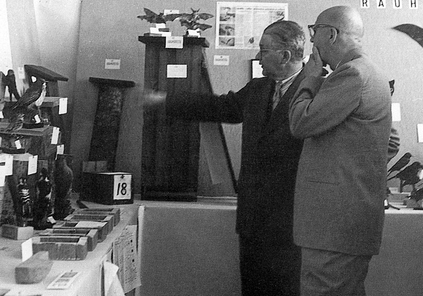 luonnonsuojelia